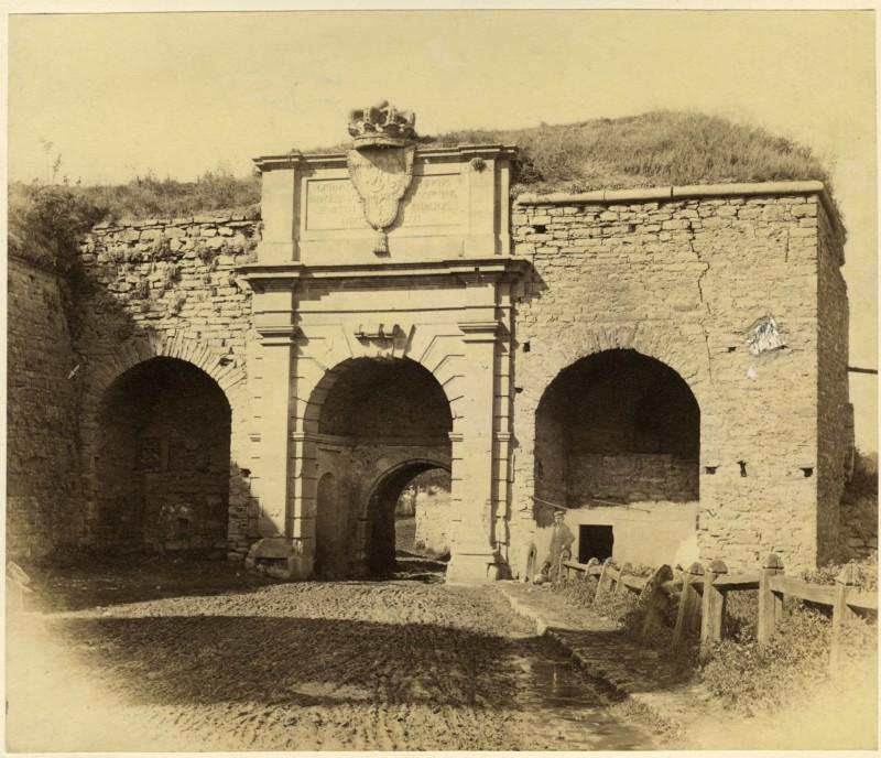 Польні замкові ворота: Польні замкові ворота в Камянці Подільському